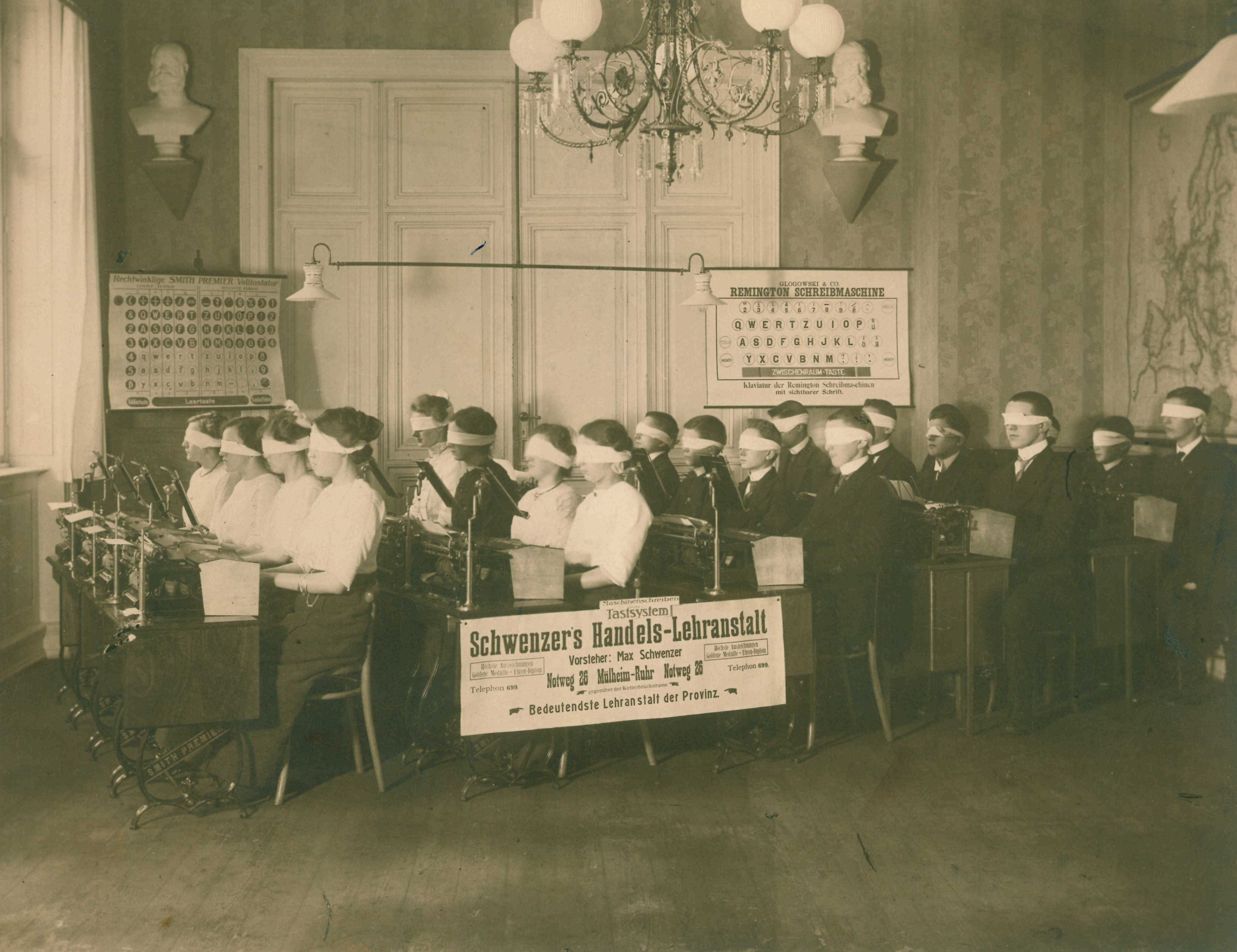 Unterricht im 10-Finger-Tastschreiben (Blindschreiben) in einer kaufmännischen Privatschule